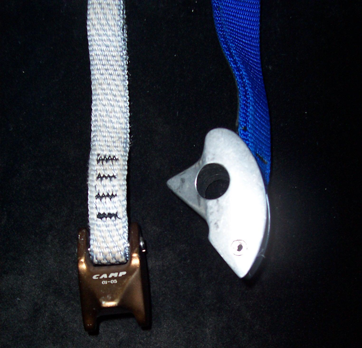 tricam